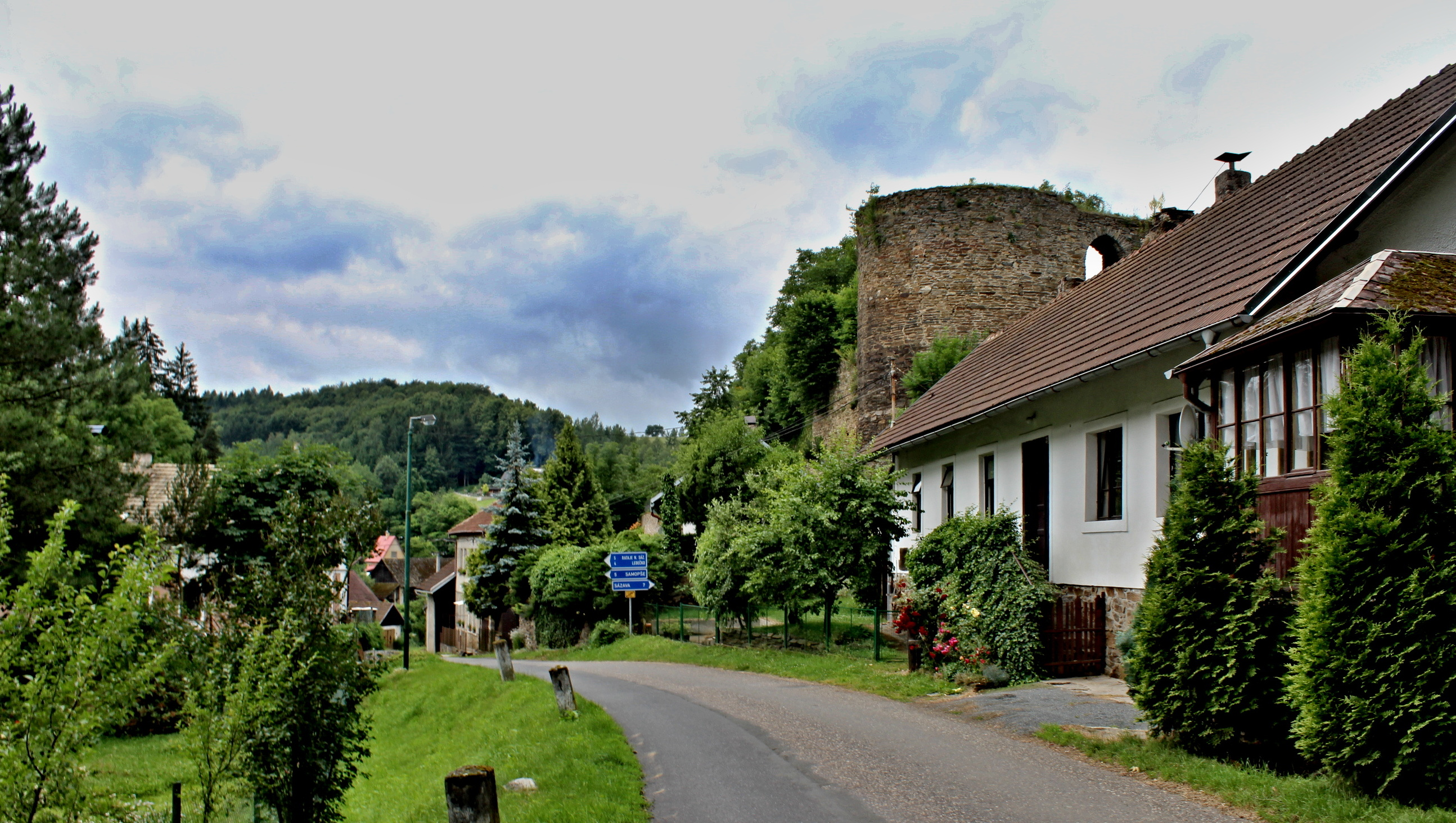 Talmberk